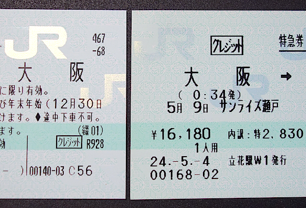 マルス券に表示される「クレジット」表示。